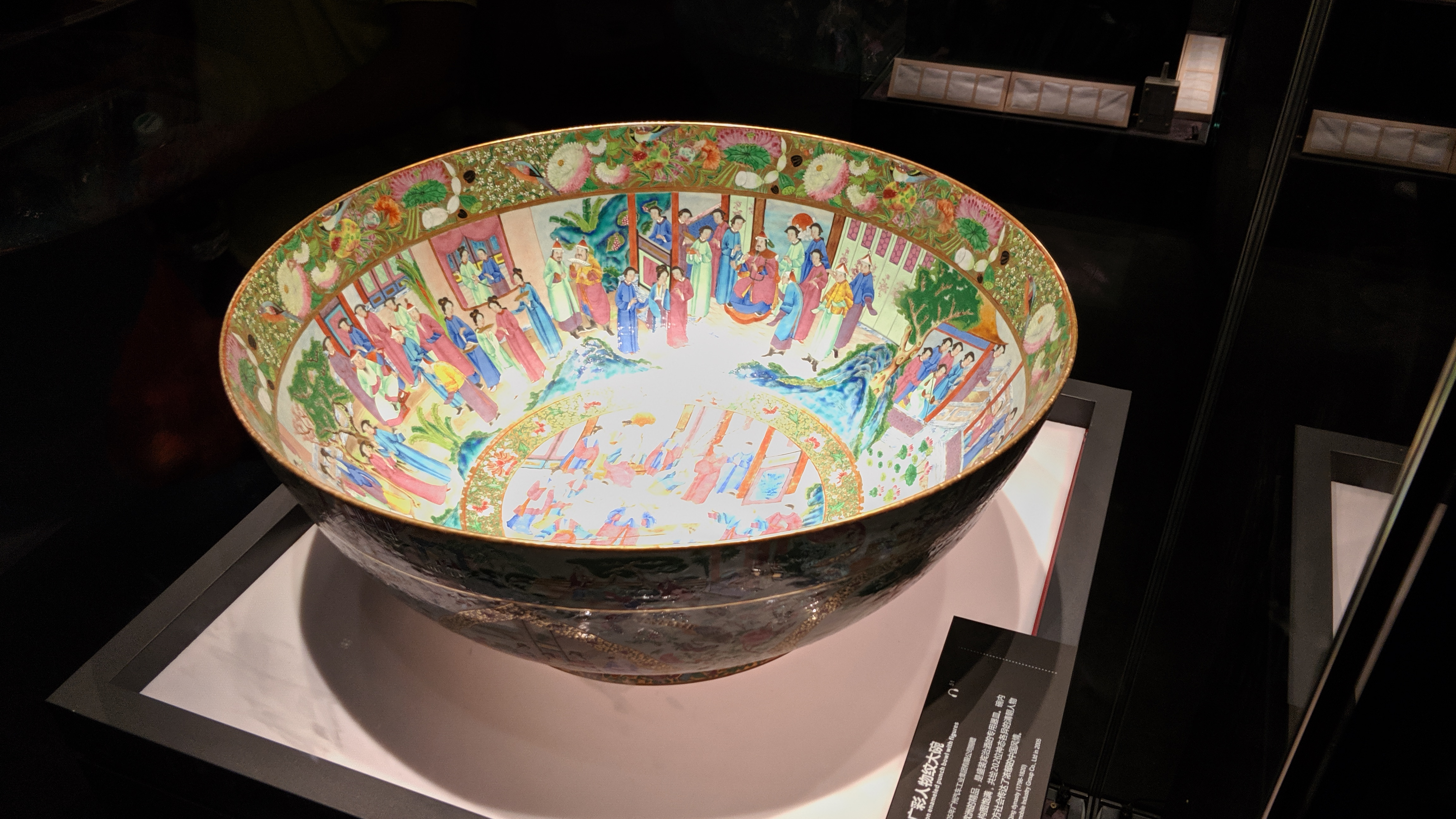 广州市博物馆馆藏_广彩大碗